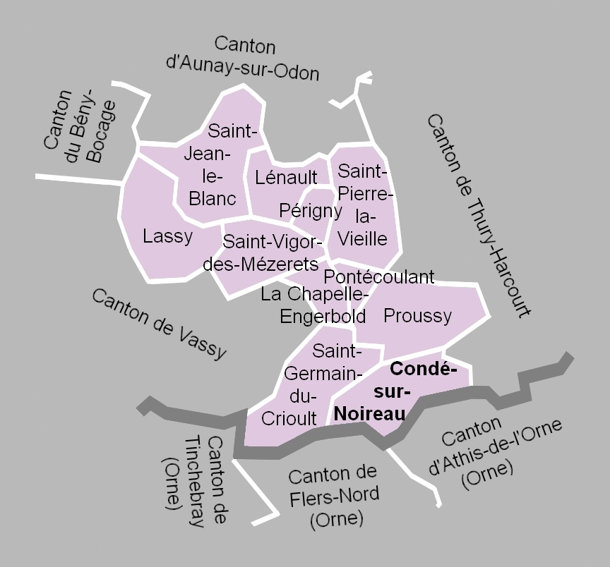 Carte du canton de Condé-sur-Noireau en 2012.